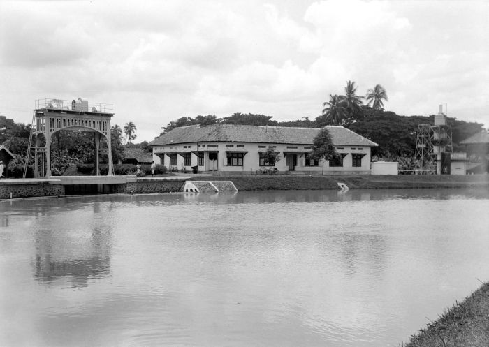 Repronegatief. Proefstation voor waterzuivering Manggarai te Meester Cornelis